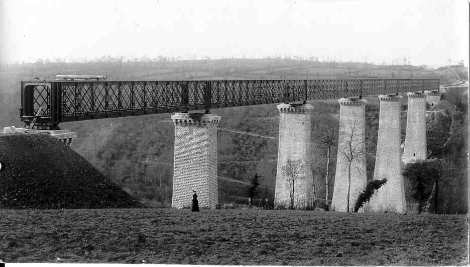 Construction